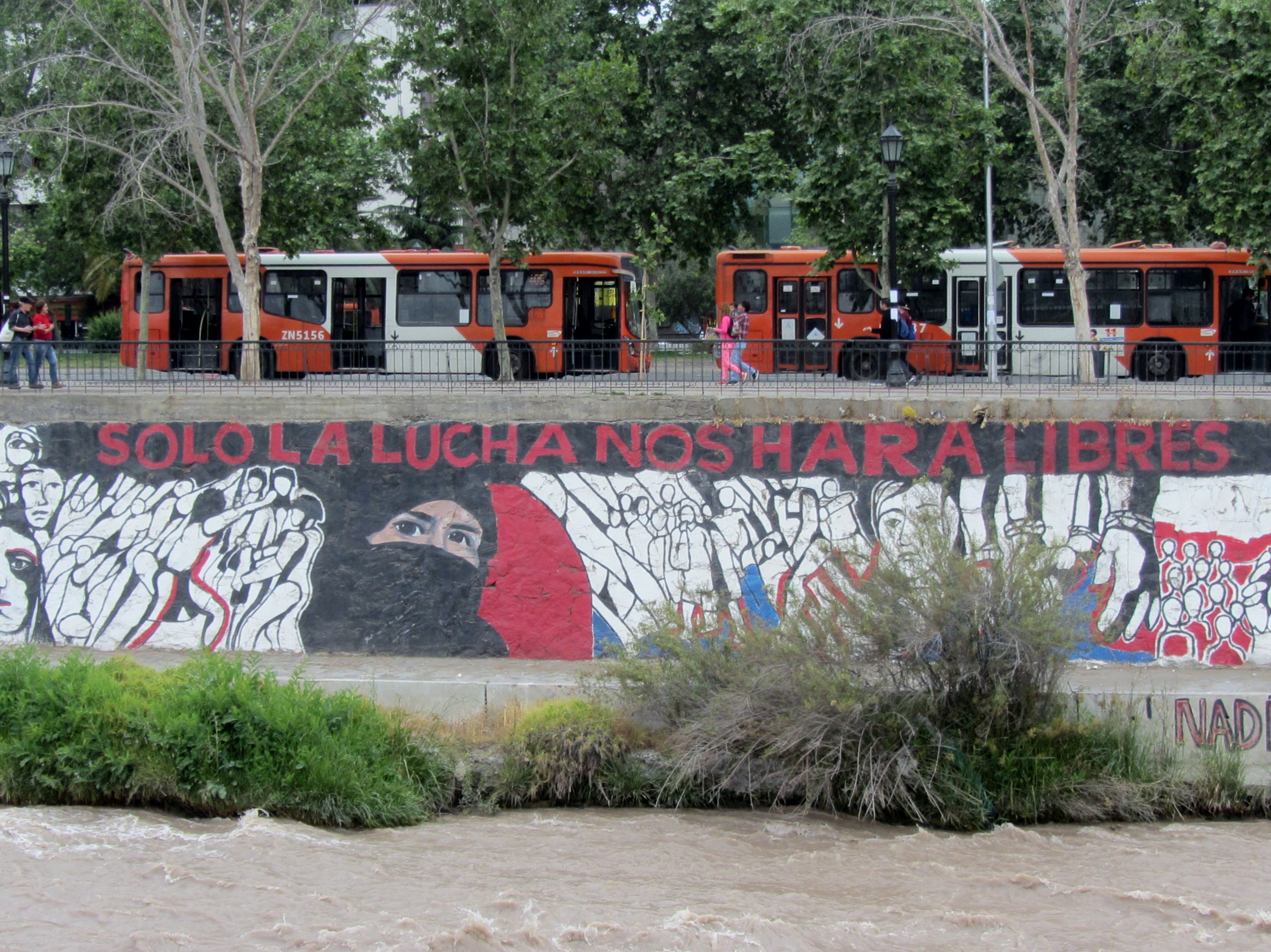 Mural en la ribera sur del río Mapocho que conmemora los 50 años del Movimiento de Izquierda Revolucionaria (Chile).